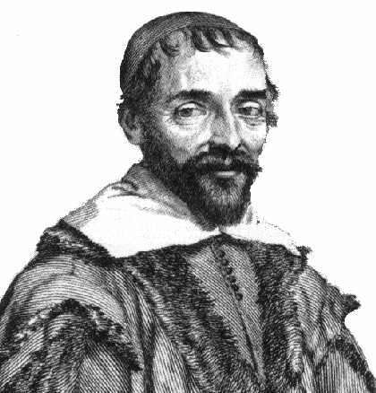 Portrait of Pierre Gassendi